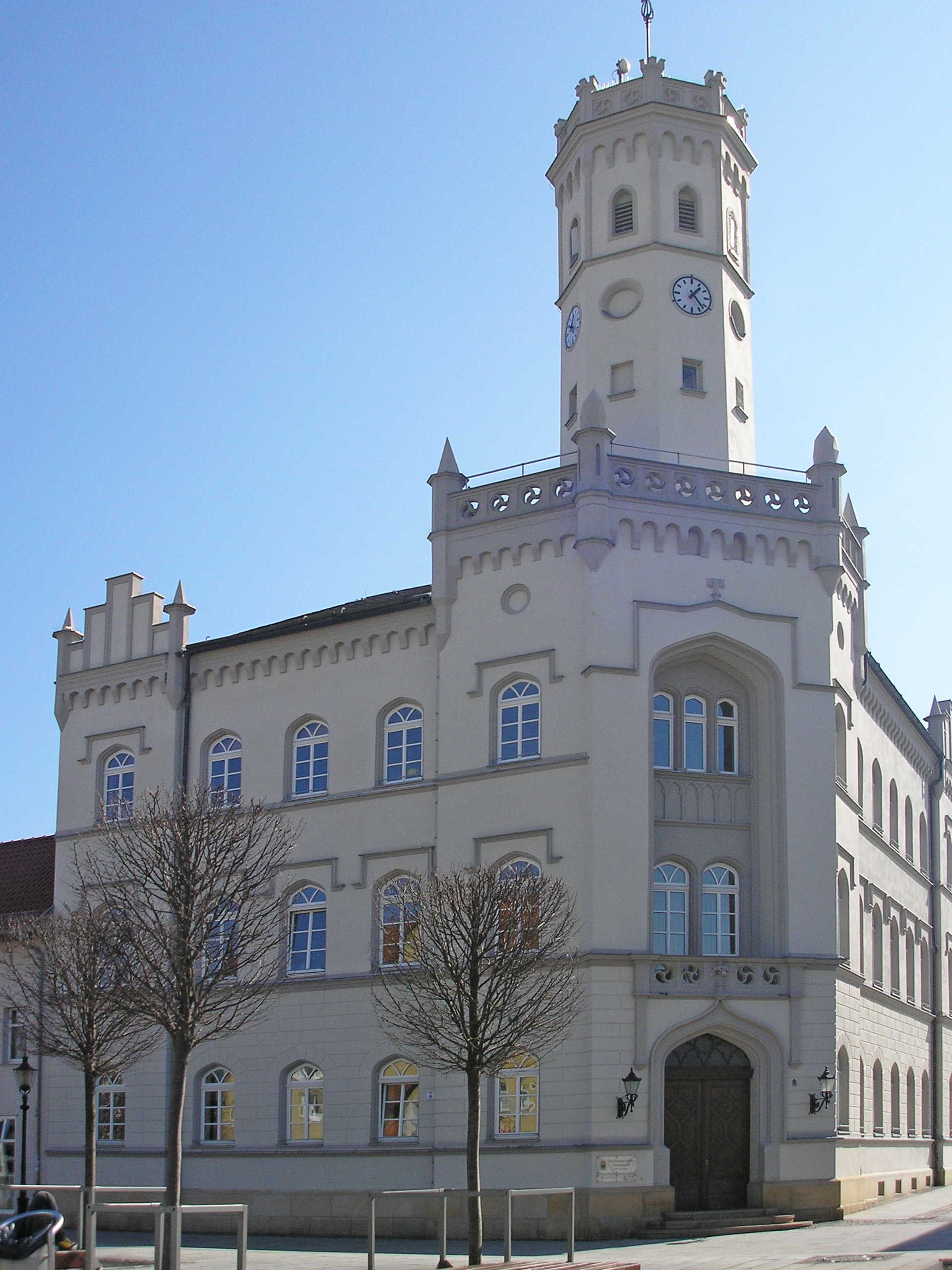 Das Rathaus in Meuselwitz (Thüringen).